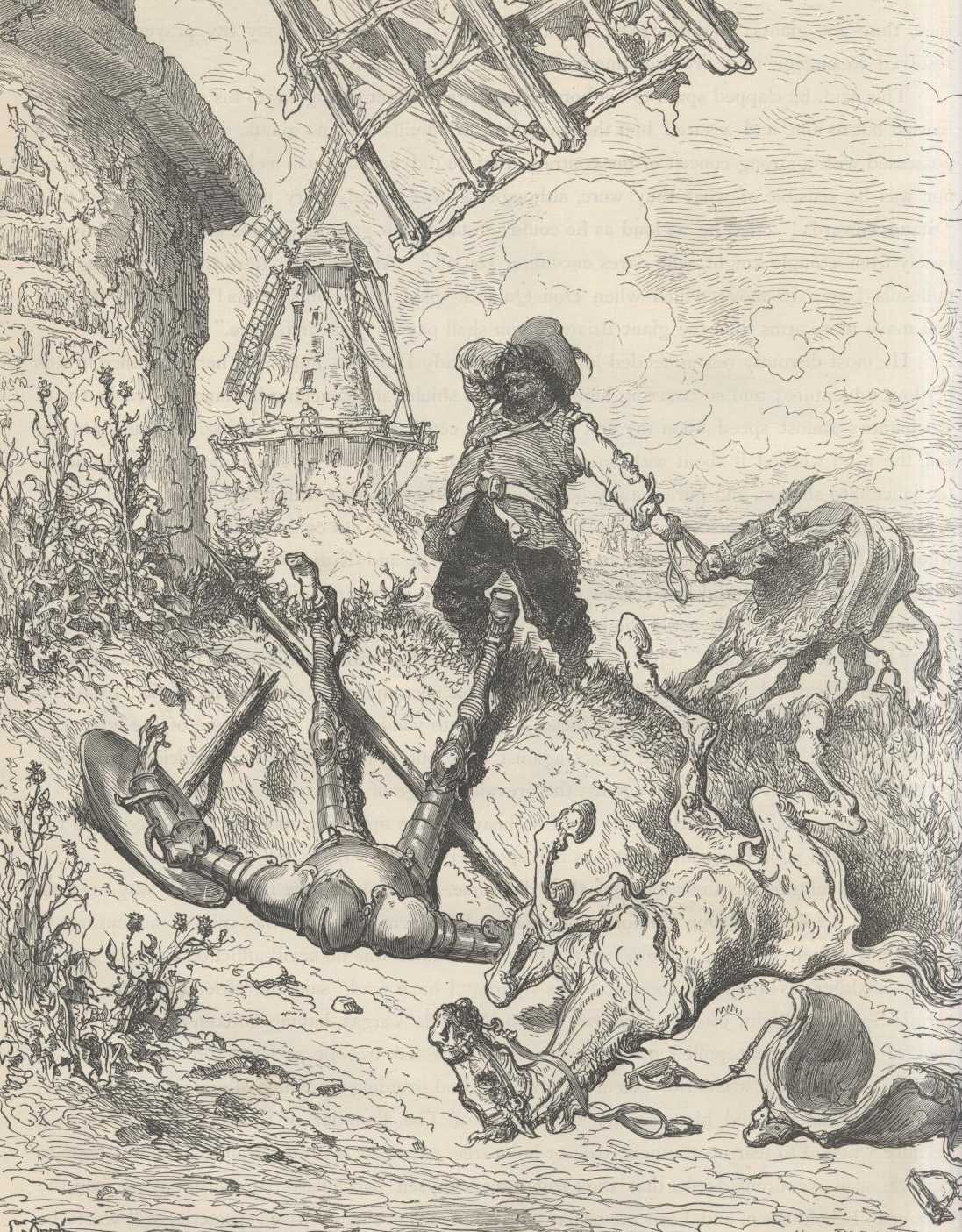 "Dom Quixote caido" (1863), iIustração por Gustave Doré para “Don Quixote“ de Miguel de Cervantes